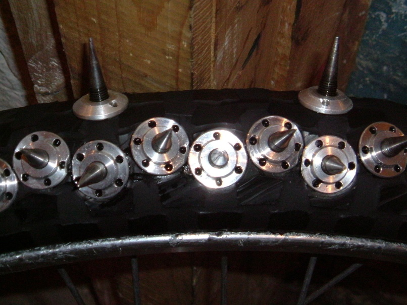 Close-up van de voorband van een ijsspeedwaymotor